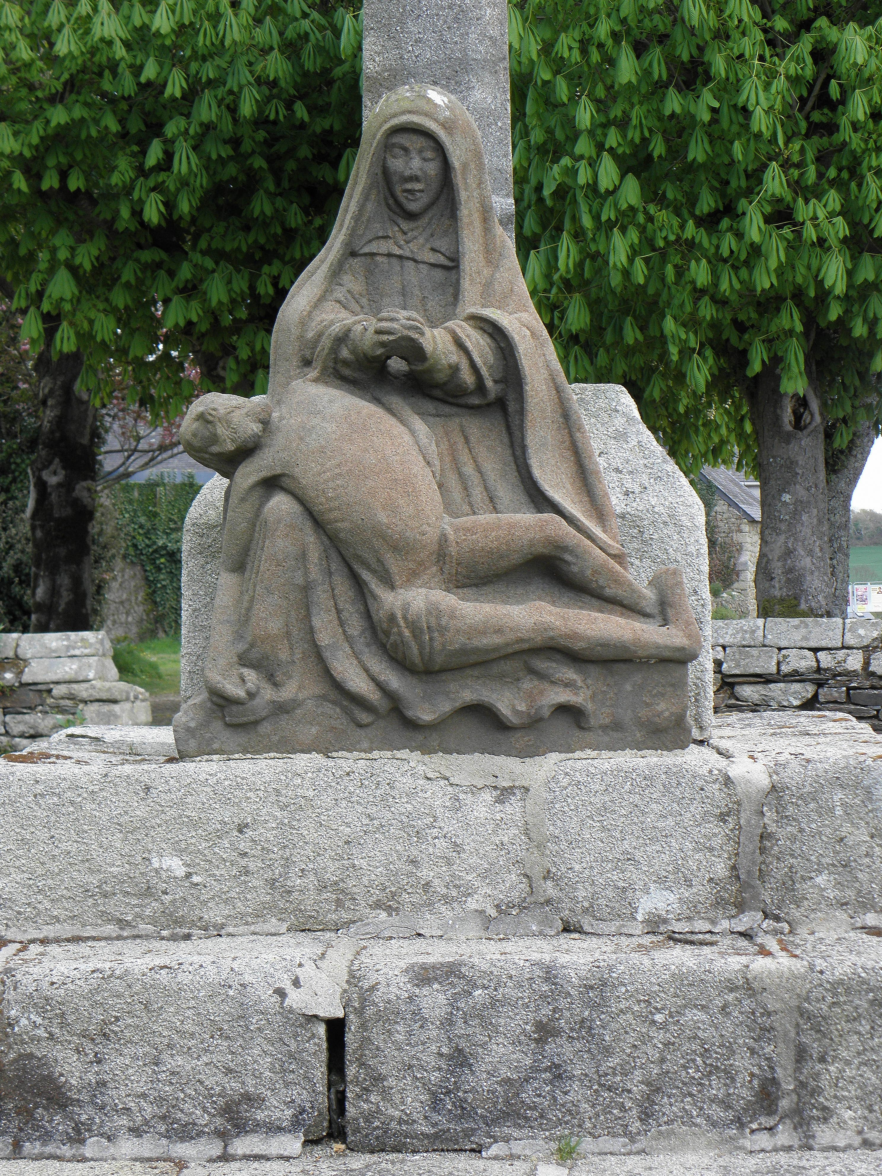 Pietà à la base du calvaire de l'église Saint-Méen de Pléven (29). .